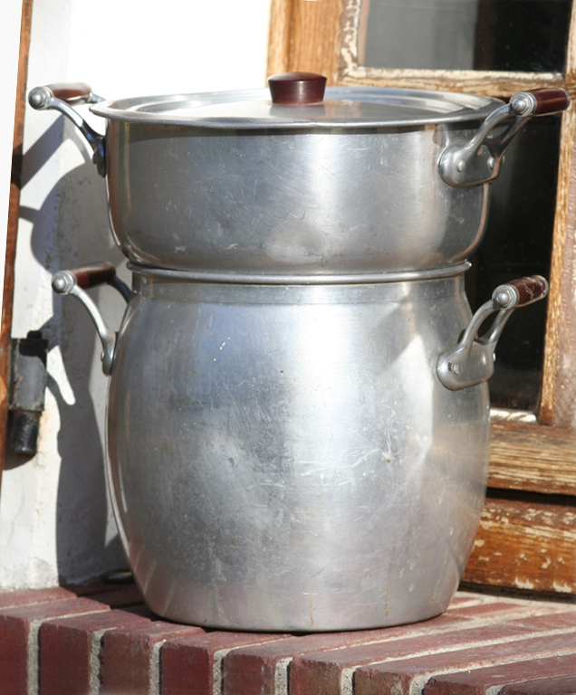 couscoussière